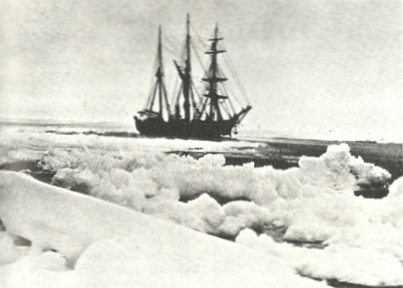 Das österreichische Kriegsschiff "Admiral Tegetthoff" im arktischen Eismeer